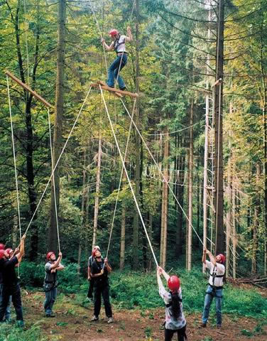 Teambeam Hochseilgarten Forest Jump